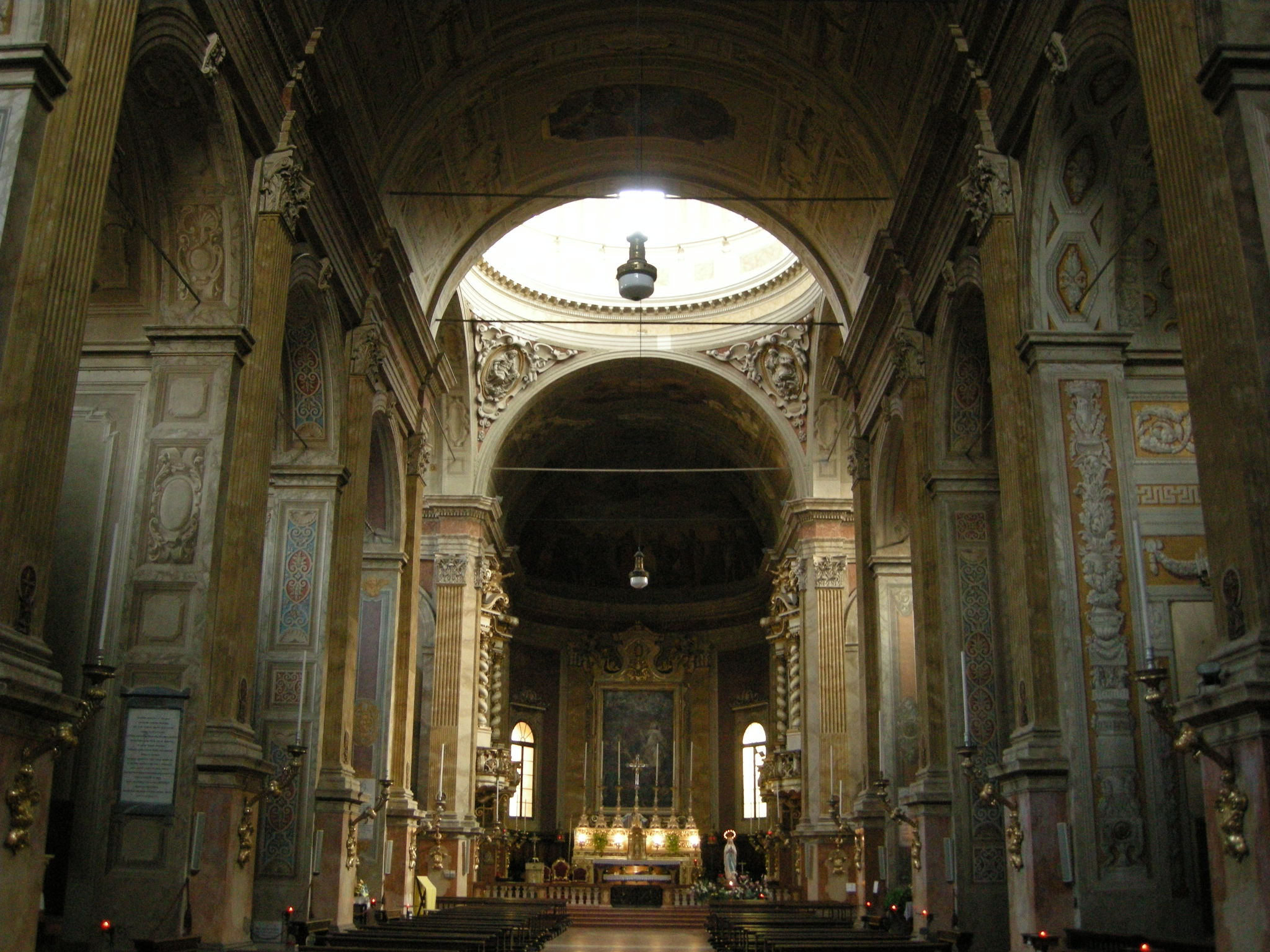 San Pietro (Reggio Emilia)